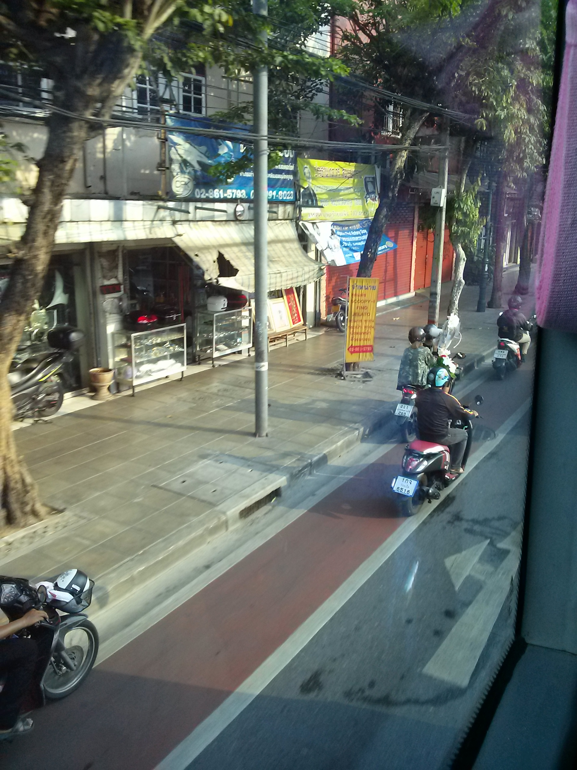 Somdet Chao Phraya, Khlong San, Bangkok 10600, Thailand